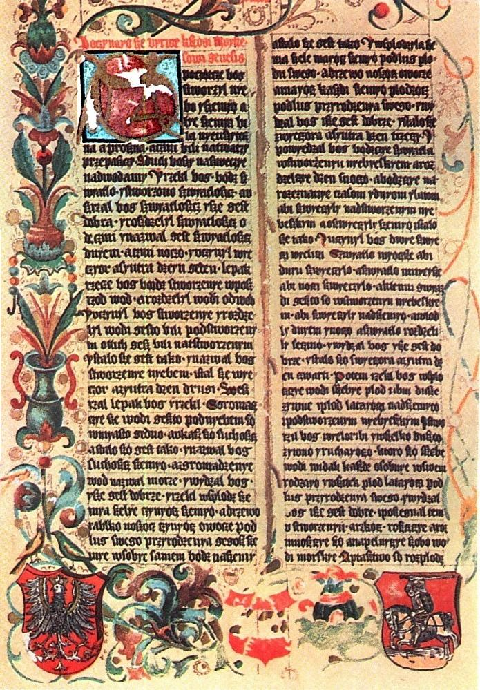 Karta z Biblii Królowej Zofii